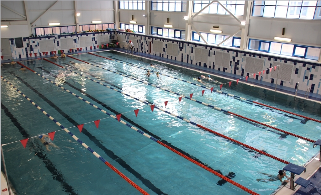 Бассейн НГУЭУ